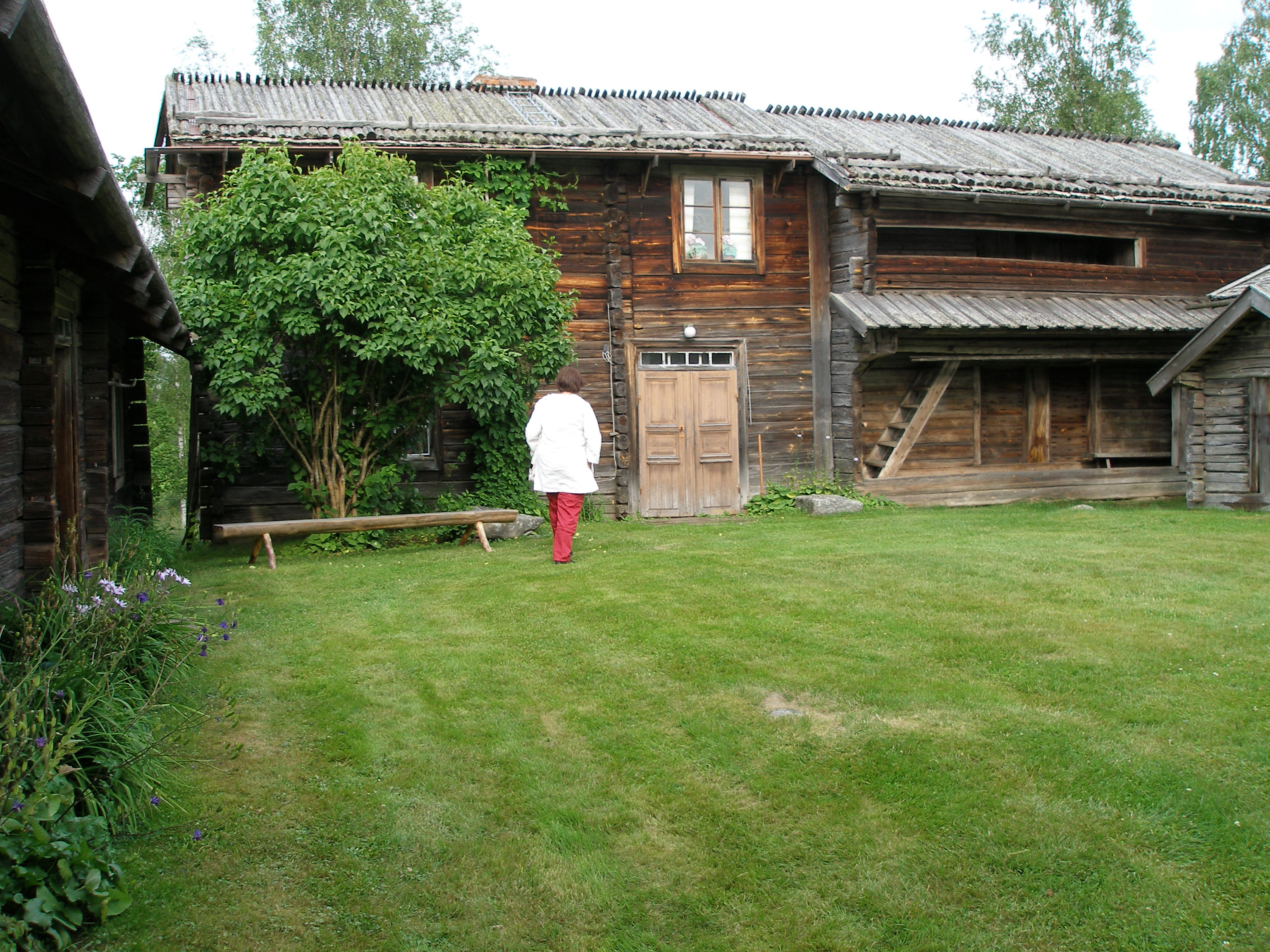 Lisskvarngården i Nås